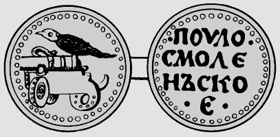 "Смоленское пуло конца XIV века из таблиц Геттингенской библиотеки". Ныне считается, что смоленского пуло не существовало и это подделка / мистификация / неверная реконструкция.